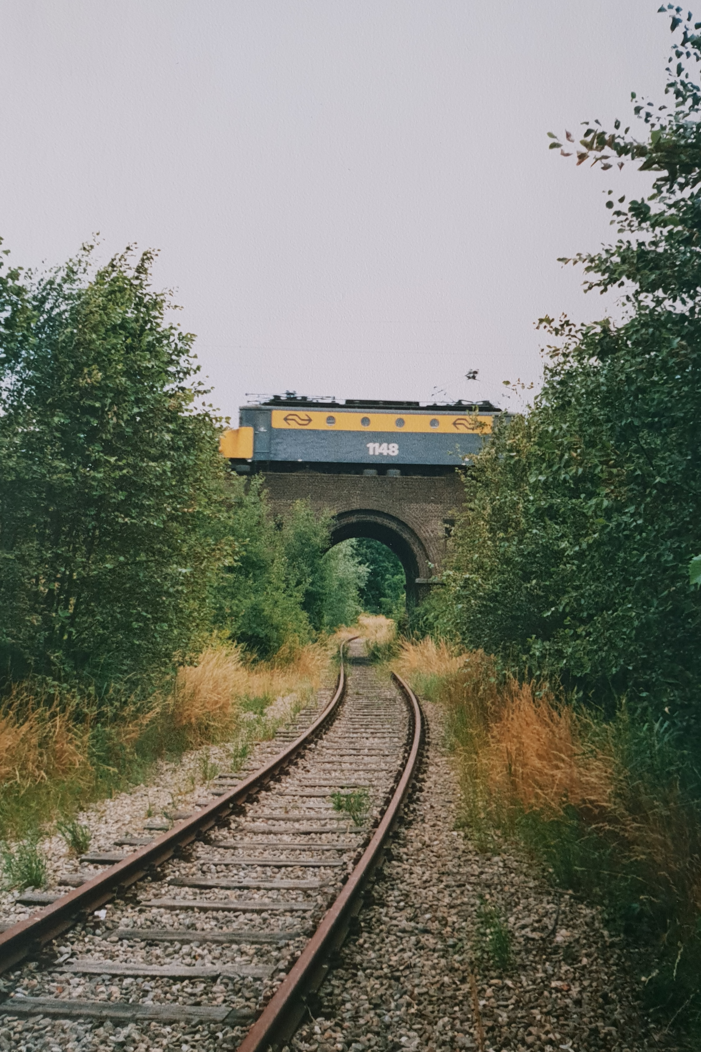 Twekkeler- of Bouwhuistunneltje in 1989 in het talud van tracé Hengelo-Enschede dicht bij de Lambertus Buddestraat in Enschede (foto: Daniel van der Ree)